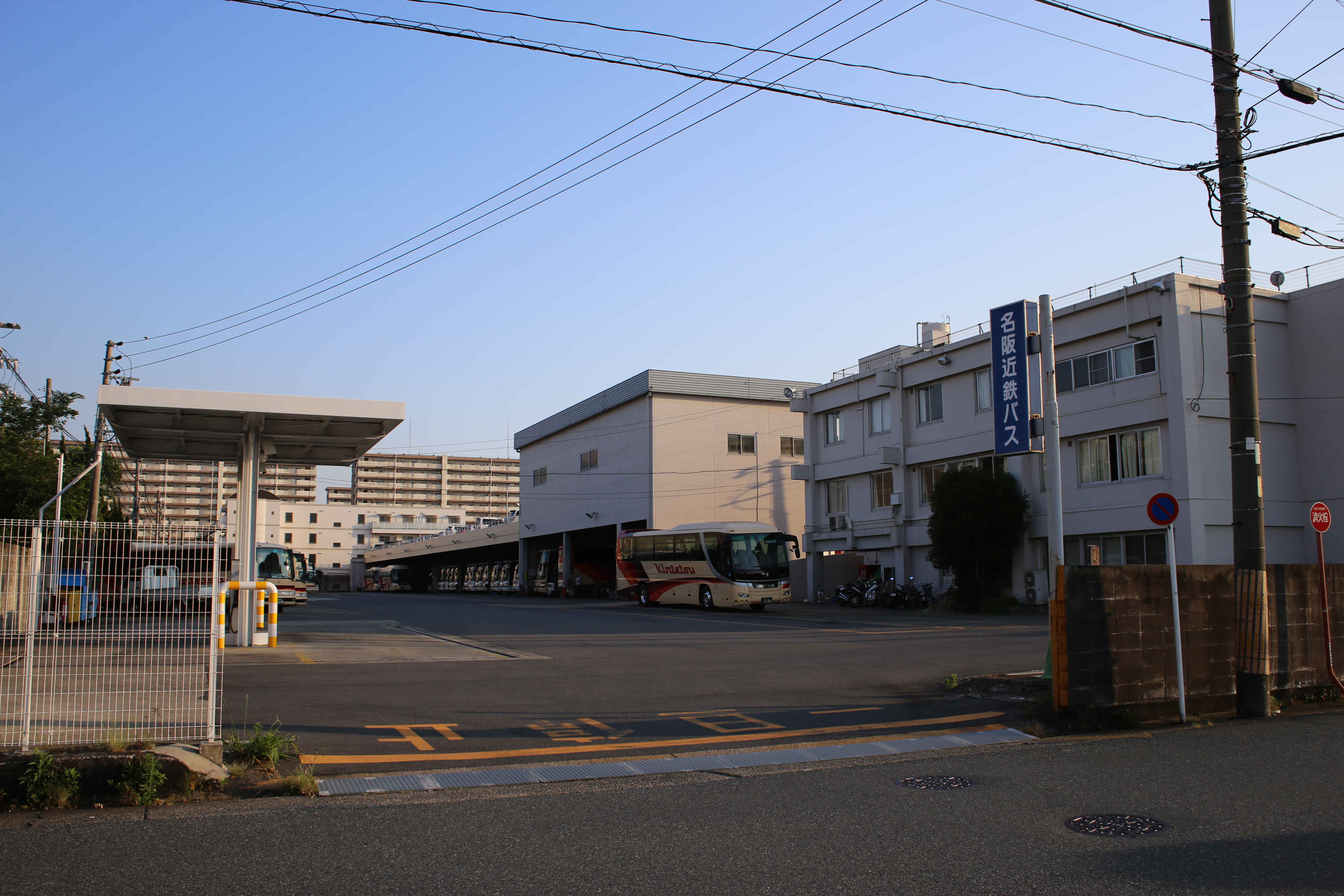 名古屋市中川区昭明町の名阪近鉄バス名古屋営業所を北側公道東側より撮影